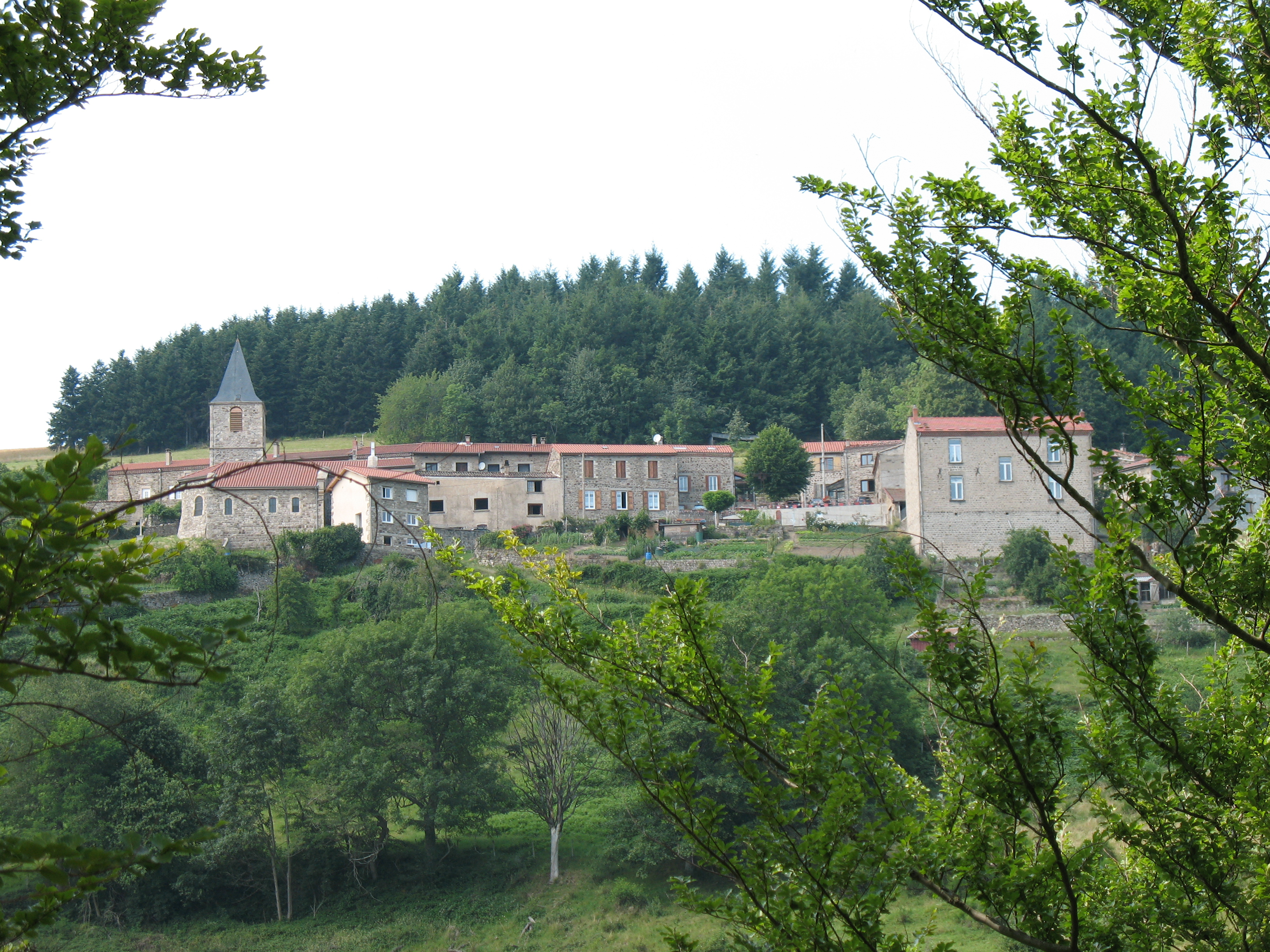 entrée du village de graix